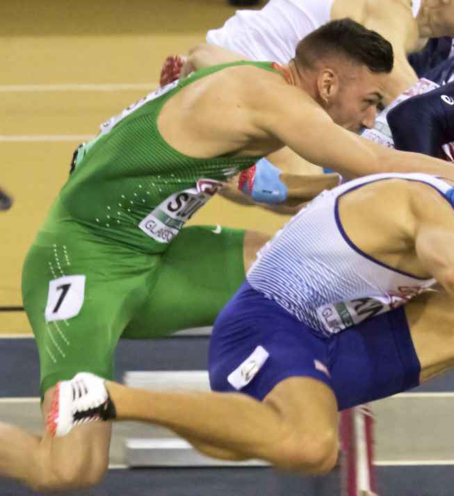 EKI30086 halve finale 60mH martinot lagarde